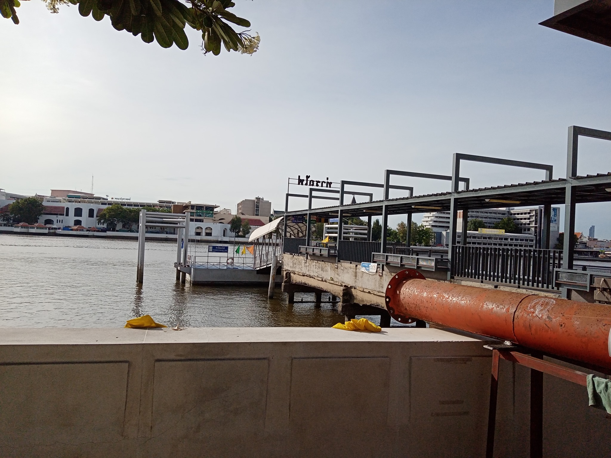 ท่ารถไฟในกลางปี 2563